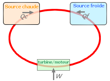 Cycle de fonctionnement d'une machine ditherme